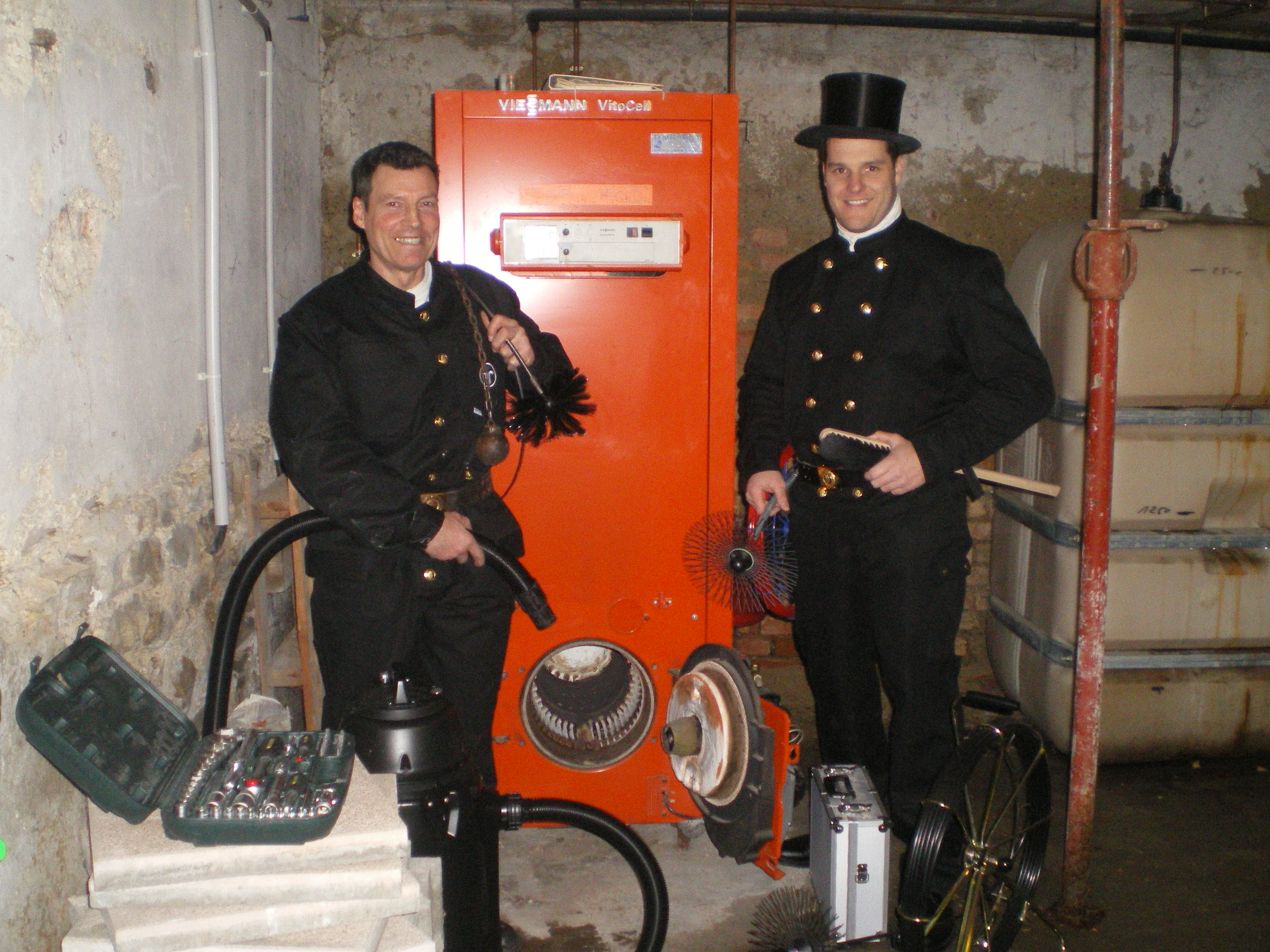 ramoneur alsacien